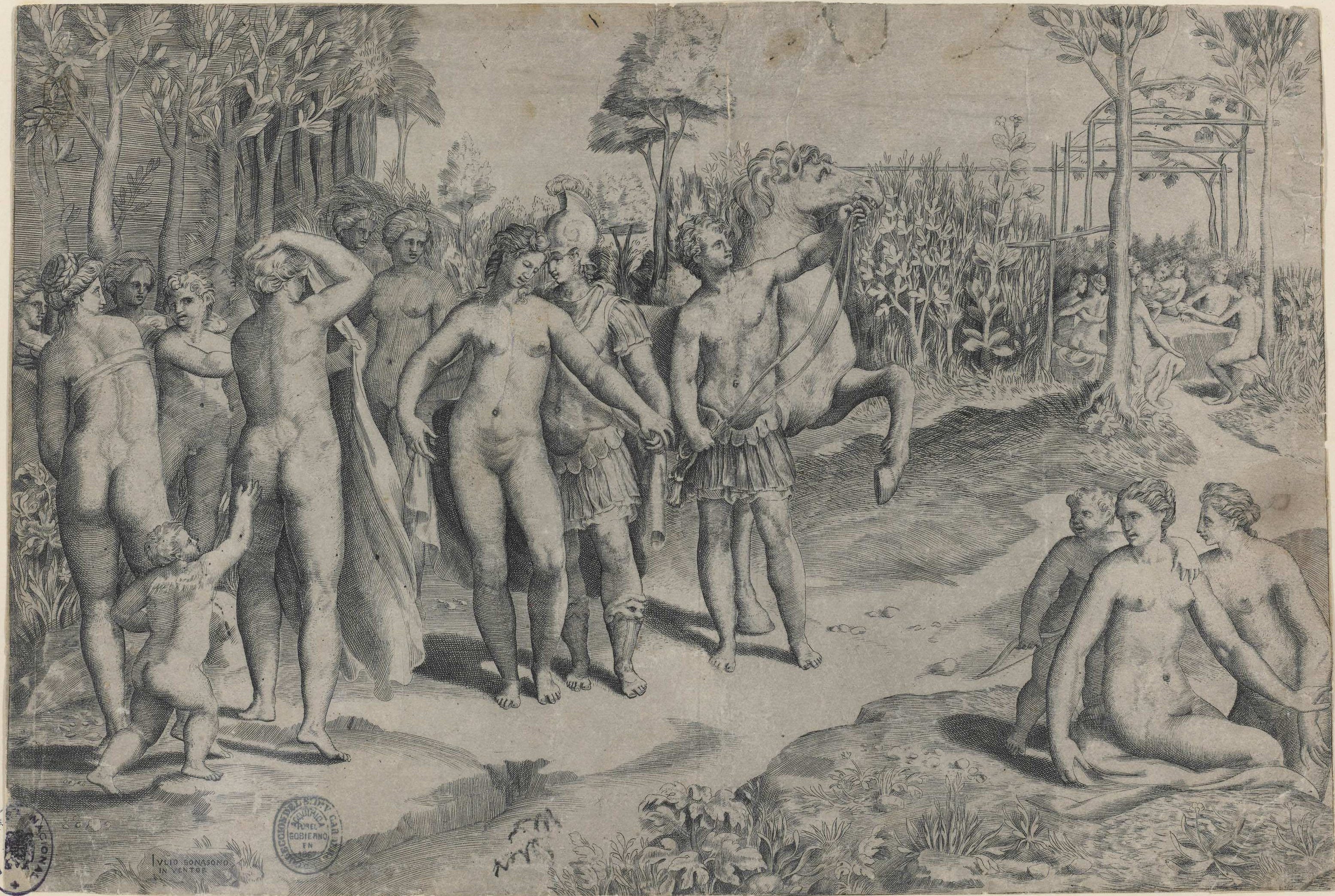 Giulio Bonasone: Rugiero en el jardín de Alcina. Biblioteca Nacional de España. Firmado: IVLIO BONASONO IN VENTOR. Biblioteca Nacional de España. Identificación del asunto tomada de Roelof van Straten, Italian prints, 1988, p. 502.